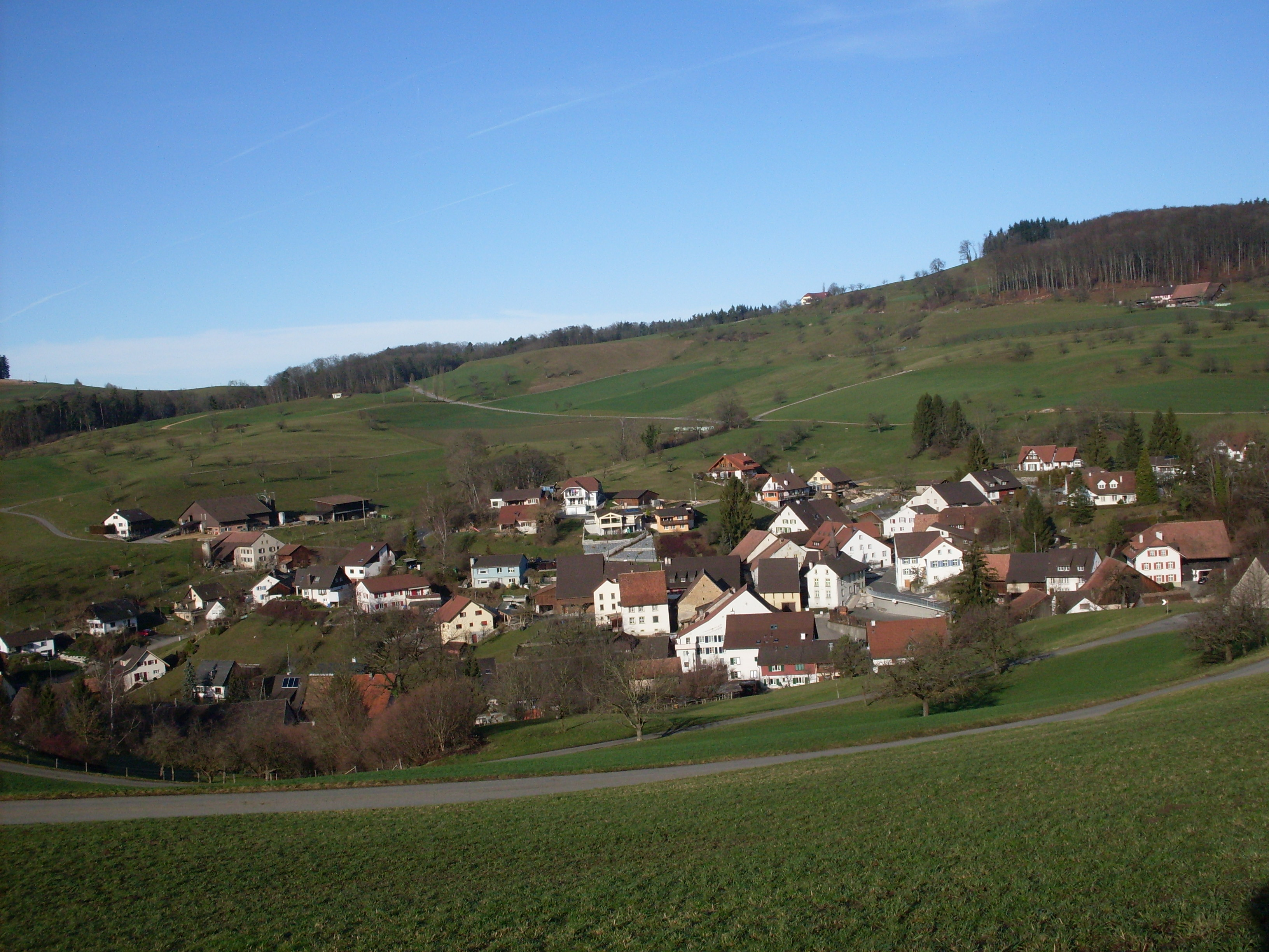 Blick auf Hemmiken, Baselland